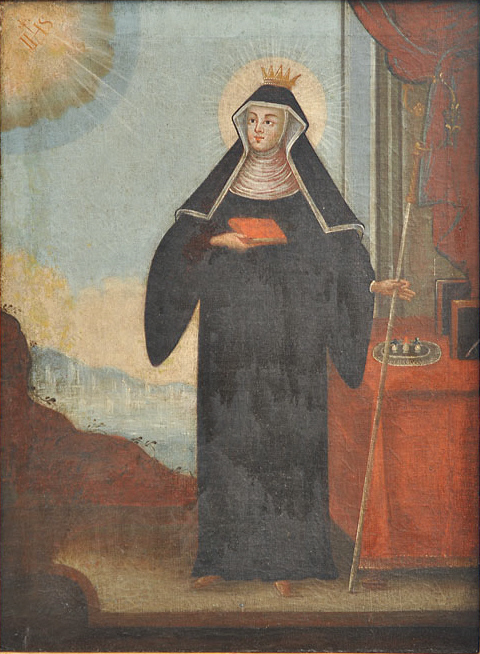 Hl. Walburga, Öl auf Leinwand, Ende 18./1. Viertel 19. Jh., 55,5 × 41,5 cm, aus dem Raum Eichstätt